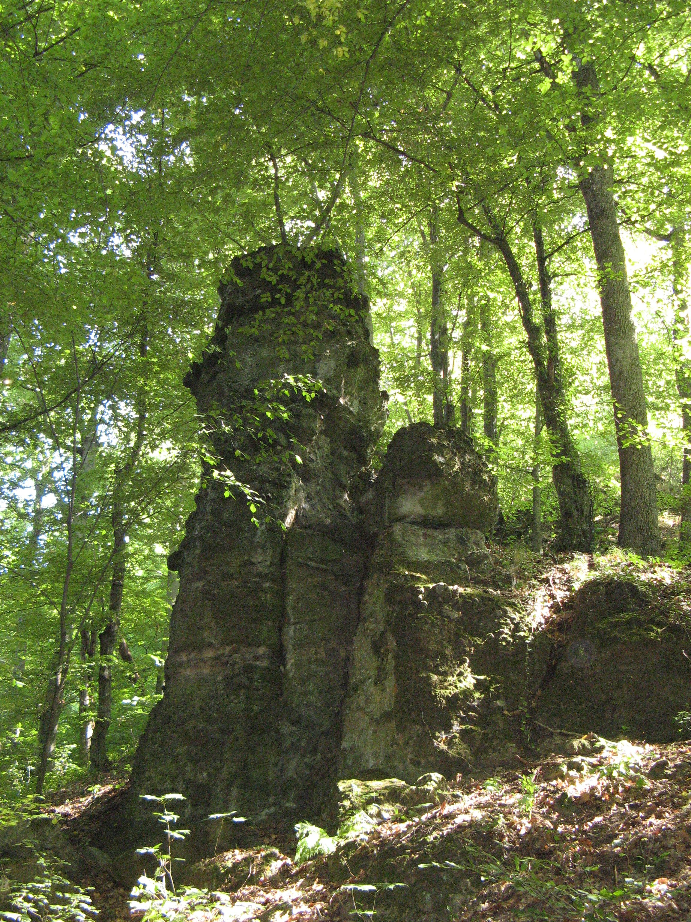 Туфовий стовп (скеля, Ужгородський район, Закарпатська обл.)